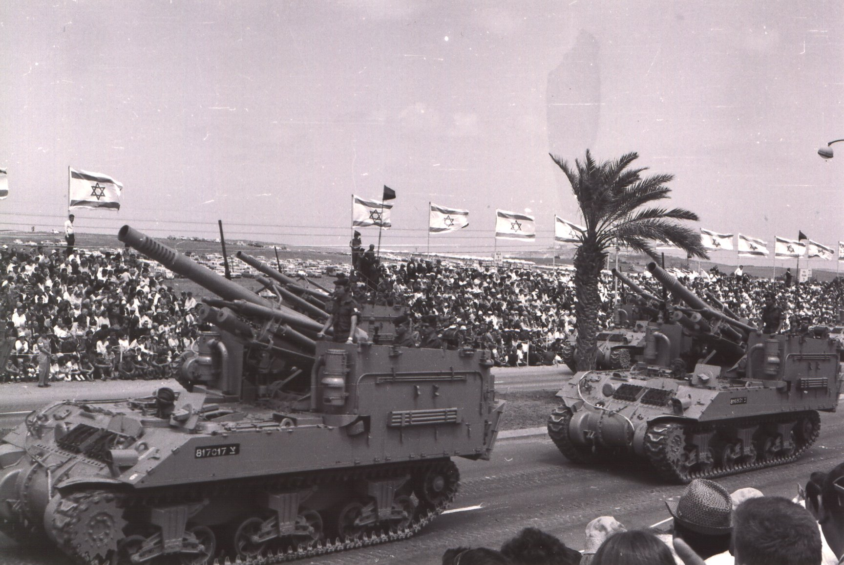 M-50 self propelled gun (built on m-4 Sherman chassis) parade in Tel-Aviv in an I.D.F. parade in 1965.תותחים מתנייעים מסוג M-50 (תותח צרפתי המורכב על מרכב שרמן) מוצגים במצעד צה"ל בתל אביב 1965